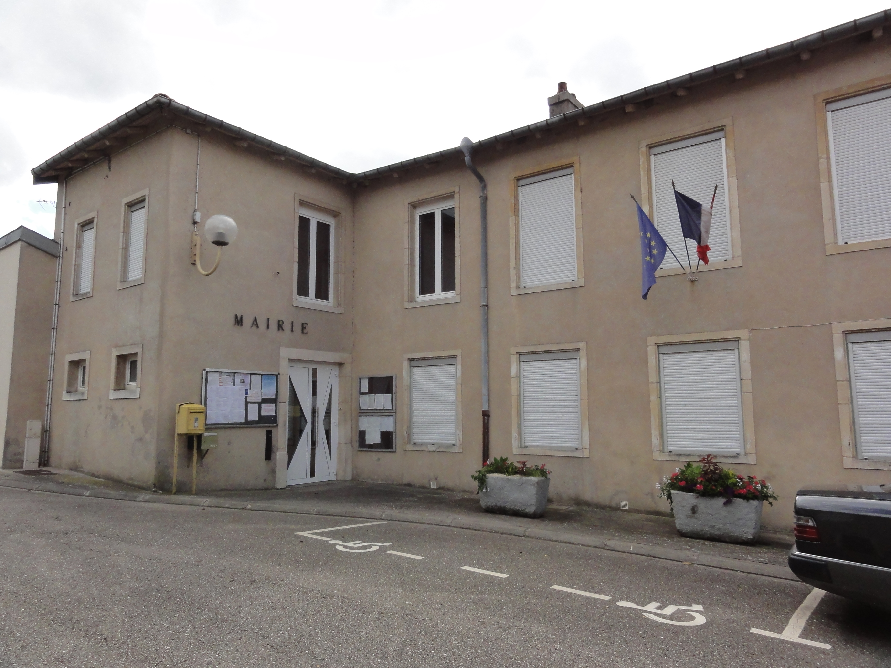 Manoncourt-en-Vermois (M-et-M) mairie